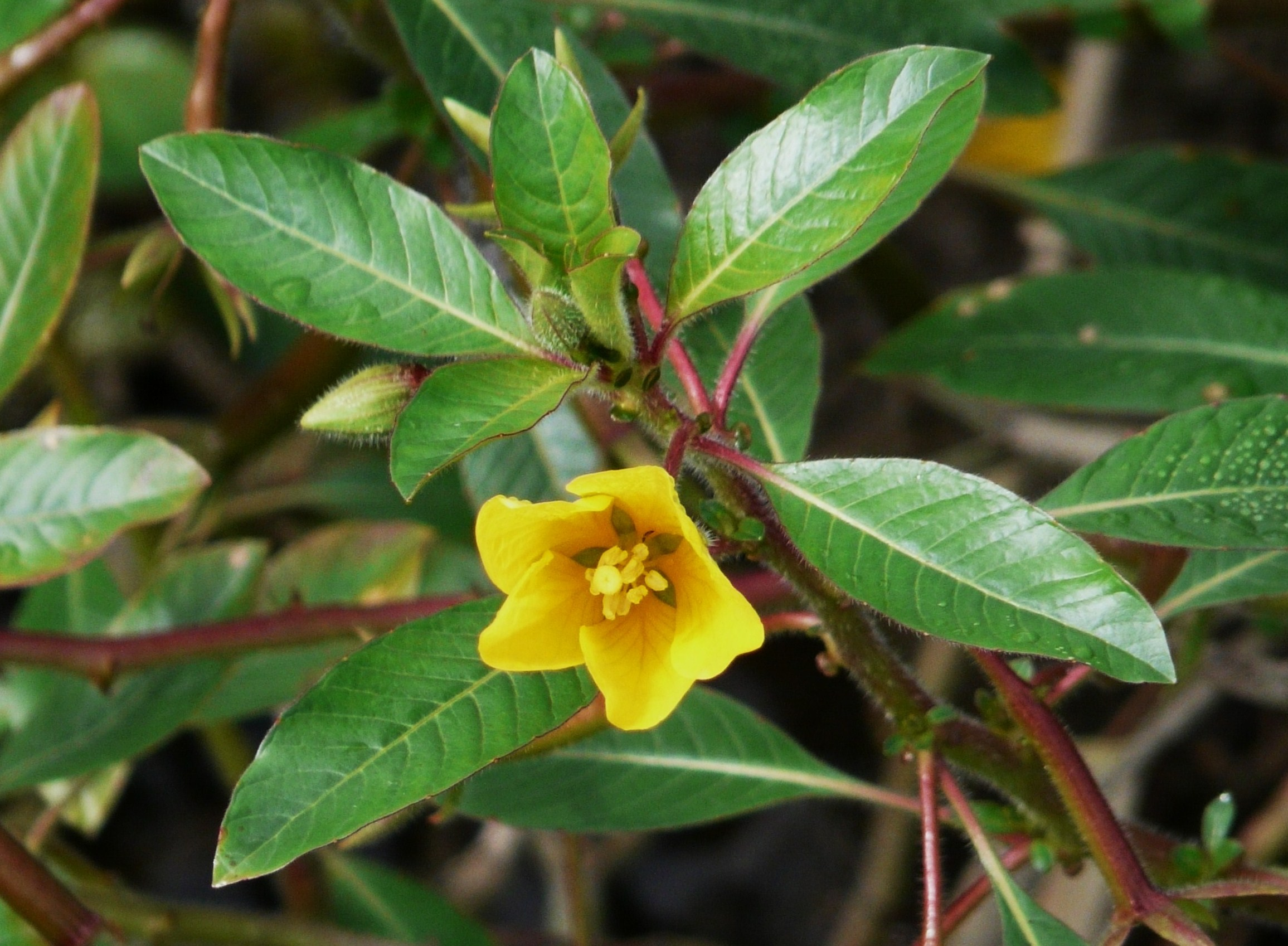 Jussie rampante (Ludwigia peploides subsp. montevidensis)